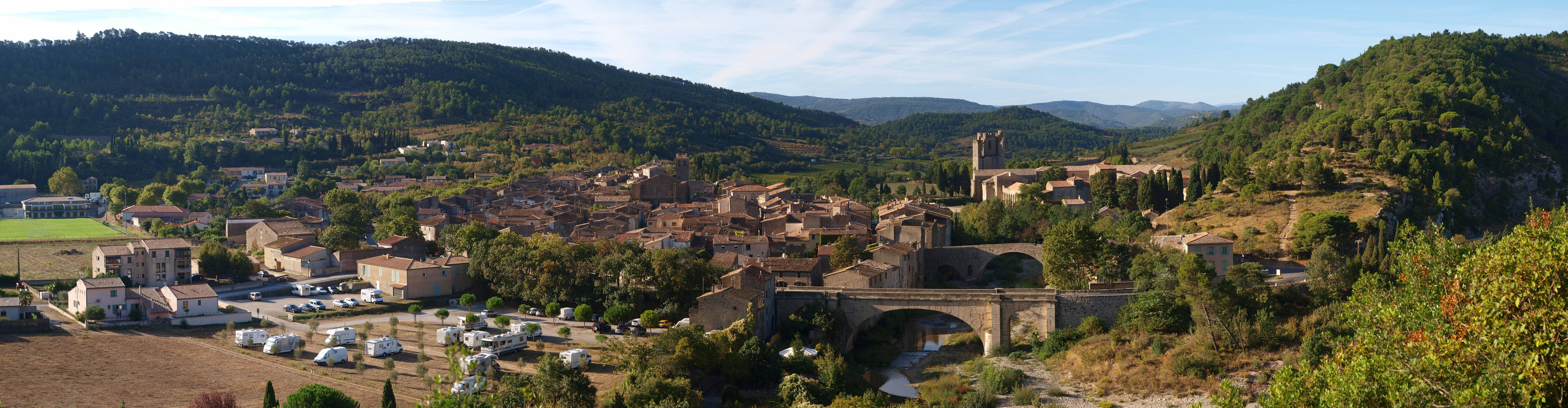 Lagrasse (Aude) - Vue générale